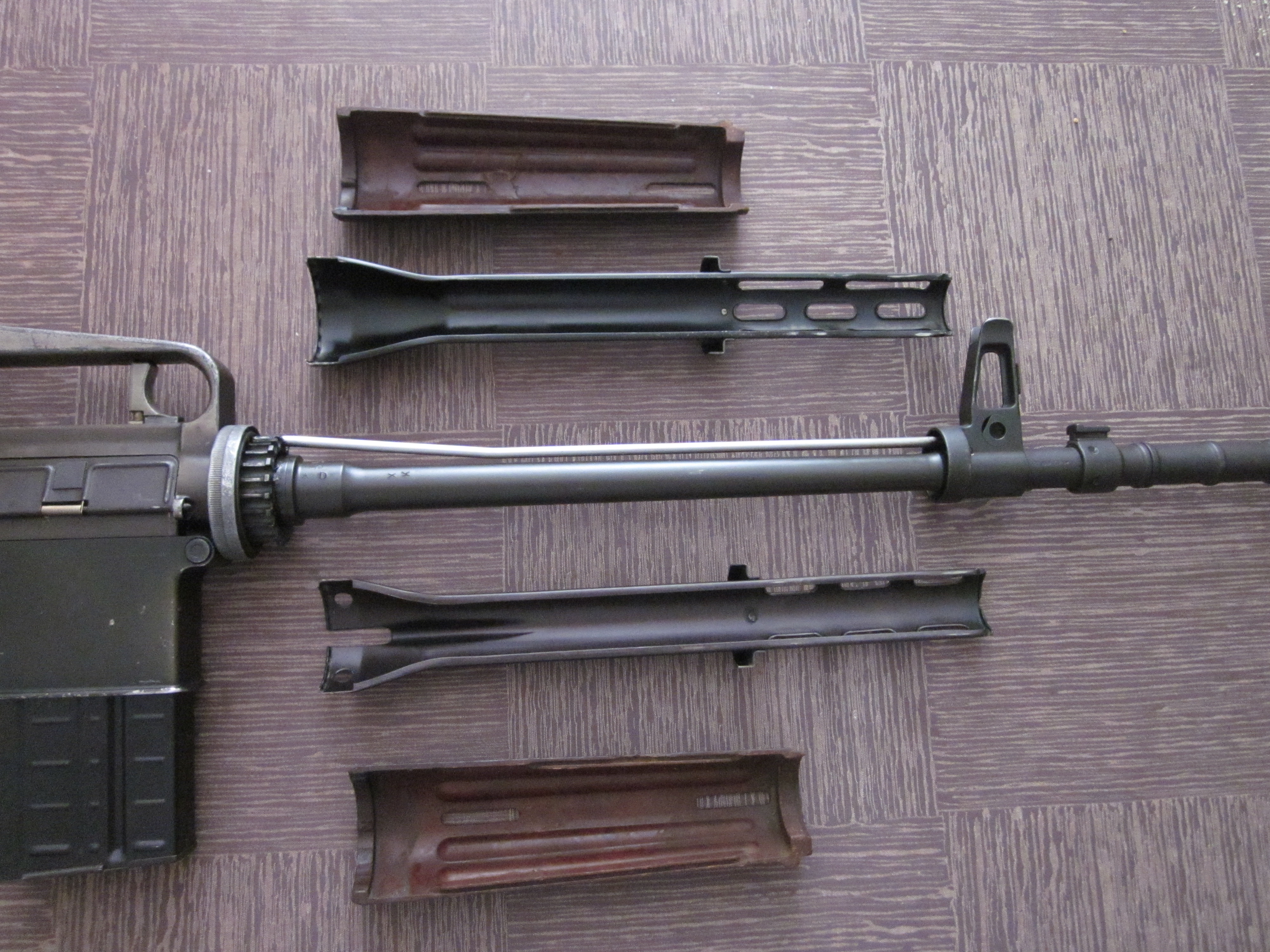 photo AR10